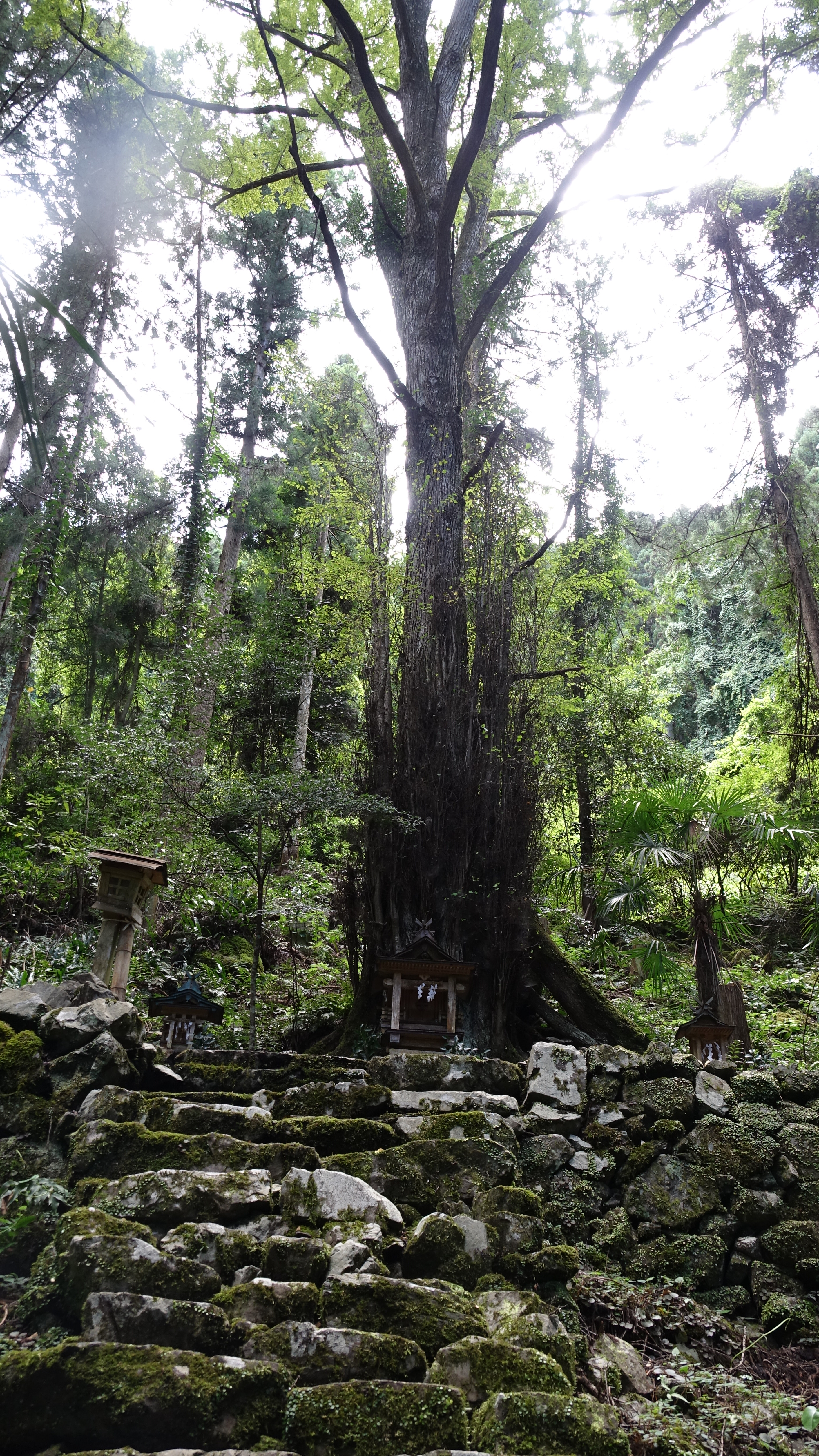 市平にあるカツラの木